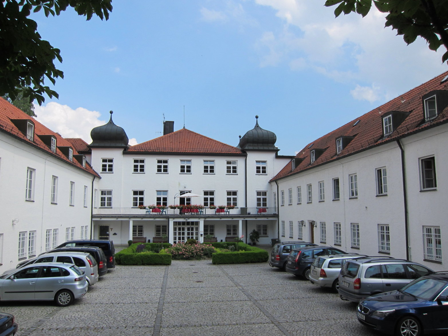 Dorfener Straße 12; ehemaliges Schloss, Dreiflügelanlage mit zwei- und dreigeschossigen Walmdachbauten, Mittelflügel wohl 18. und 1. Hälfte 19. Jahrhundert, Seitenflügel wohl modern.